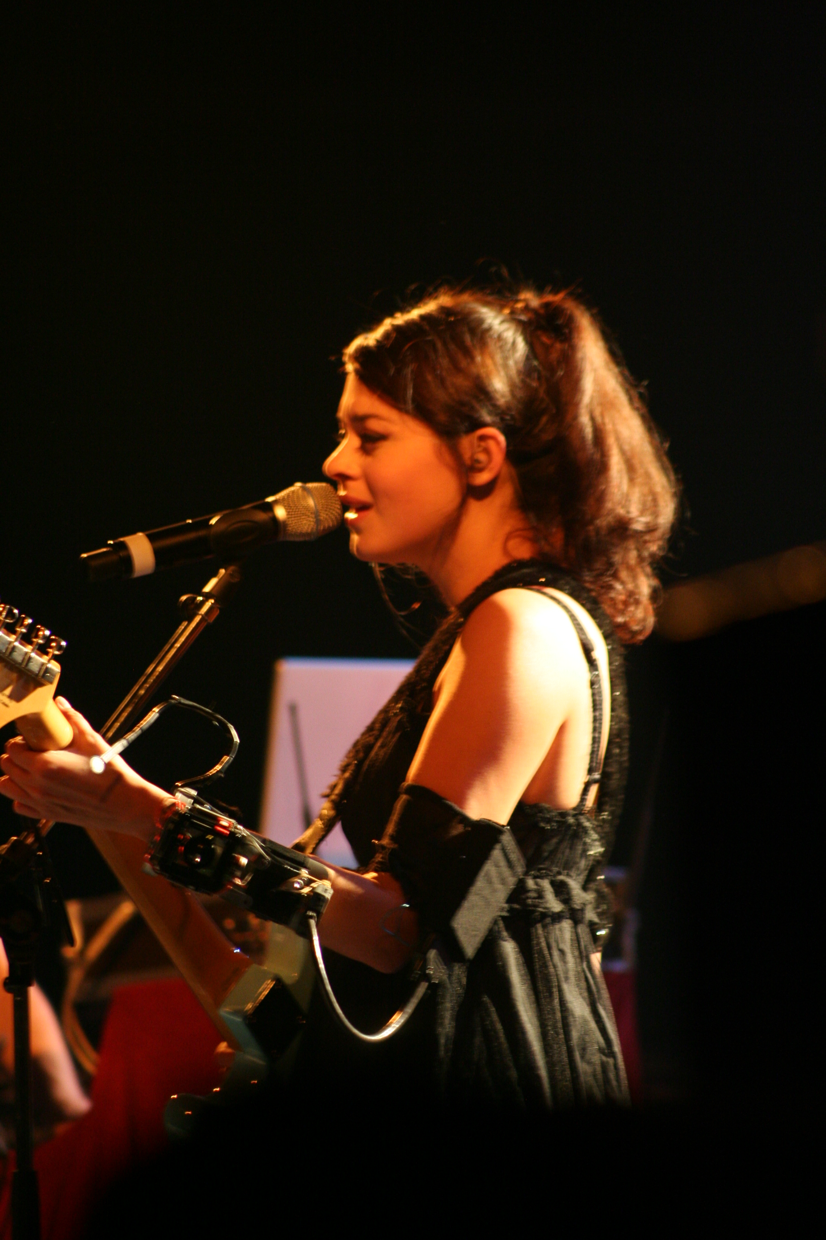 A La Vapeur (Dijon) le 10/05/2006